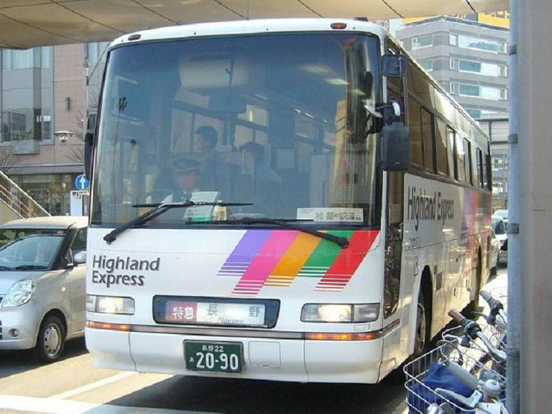 登録番号：長野22あ20-90 川中島バス所属 高速用車両（各系統で共通運用） 日野・セレガ U-RU3FSAB